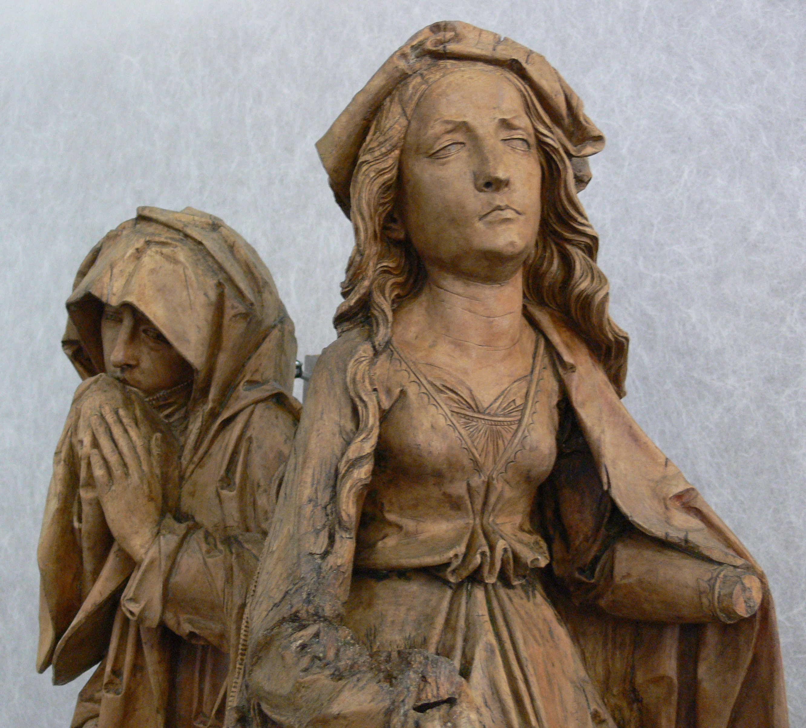 Trauernde Frauen, aus einer Beweinungsgruppe, vielleicht von der Predella des Detwanger Altars, Tilman Riemenschneider, Lindenholz (ursprünglich gefasst), Würzburg um 1508 Landesmuseum Württemberg Stuttgart